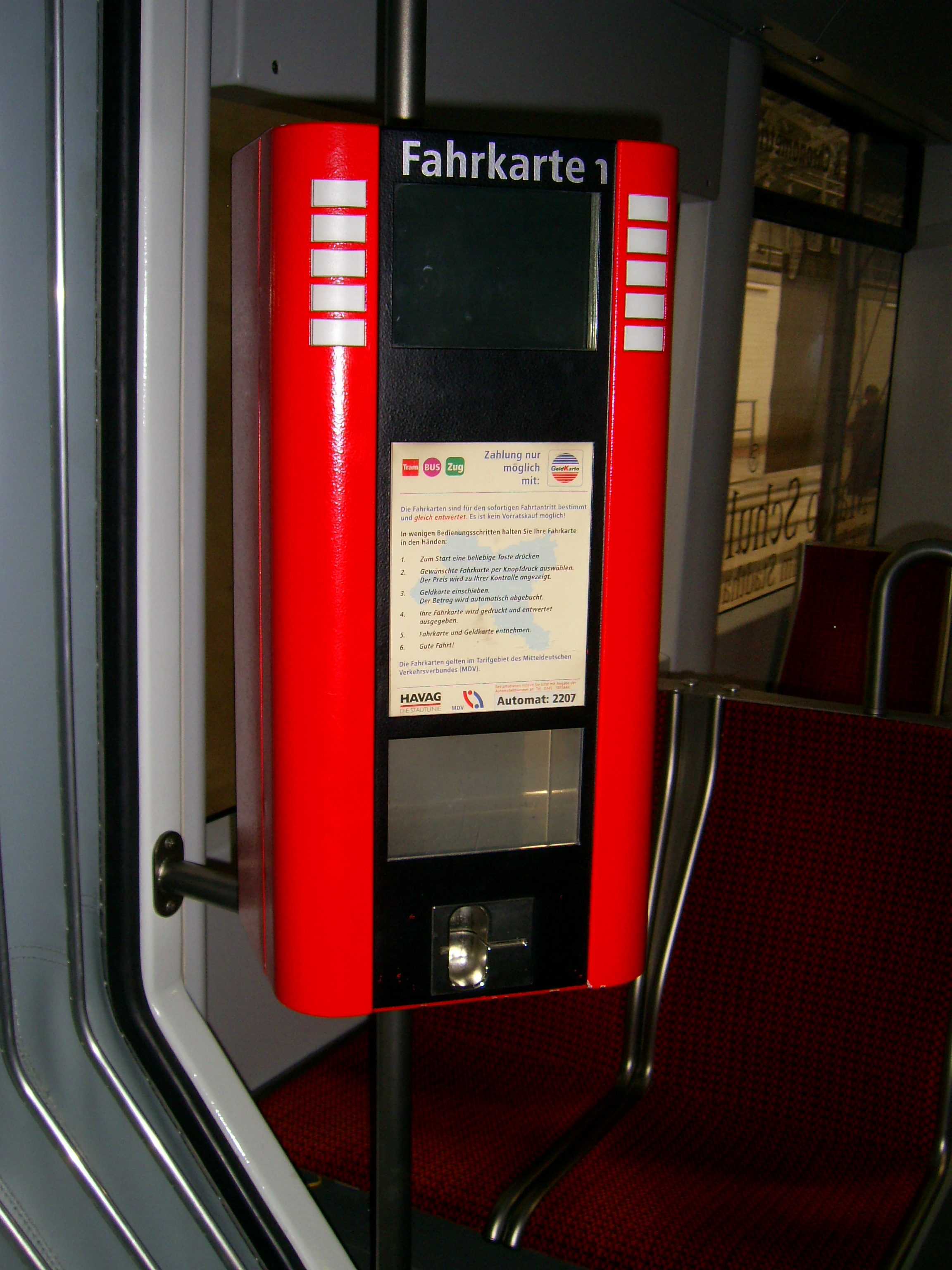 Strassenbahn Halle Automat im Fahrzeug